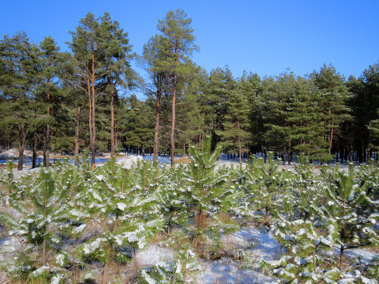 Сосновый лес в Волгоградской области